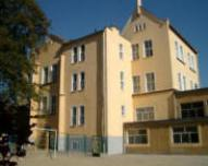 Zdjęciie Publicznej Szkoły Podstawowej nr 4 im. Kornela Makuszyńskiego w Strzegomiu.